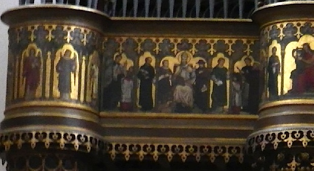 Detail Brüstungsmalerei